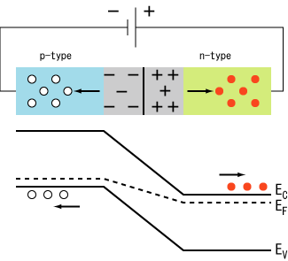 pn junction diode under reverse bias